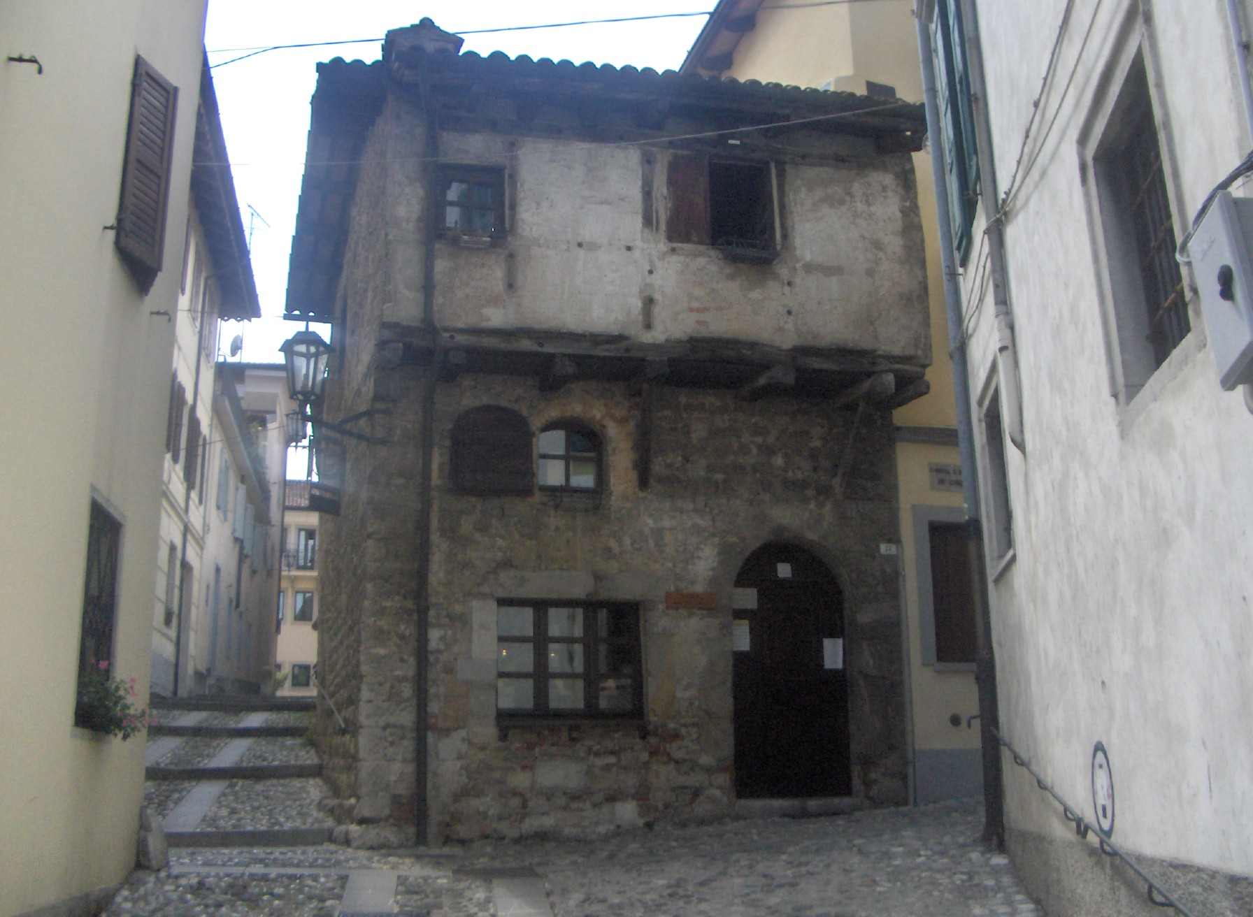 Sebi1, Cividale del Friuli - Casa Medievale di Borgo Brossana